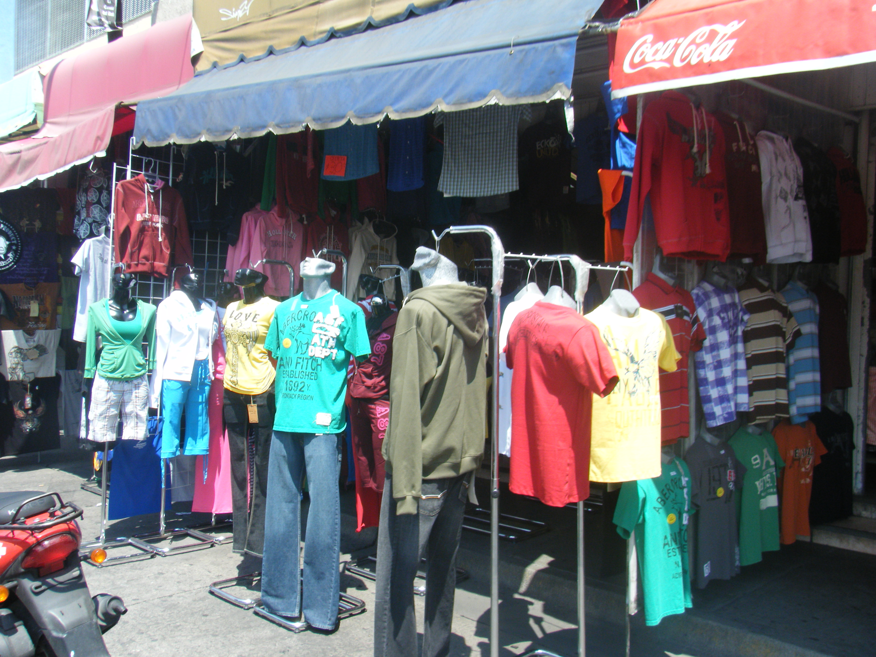 Uriangato ropa